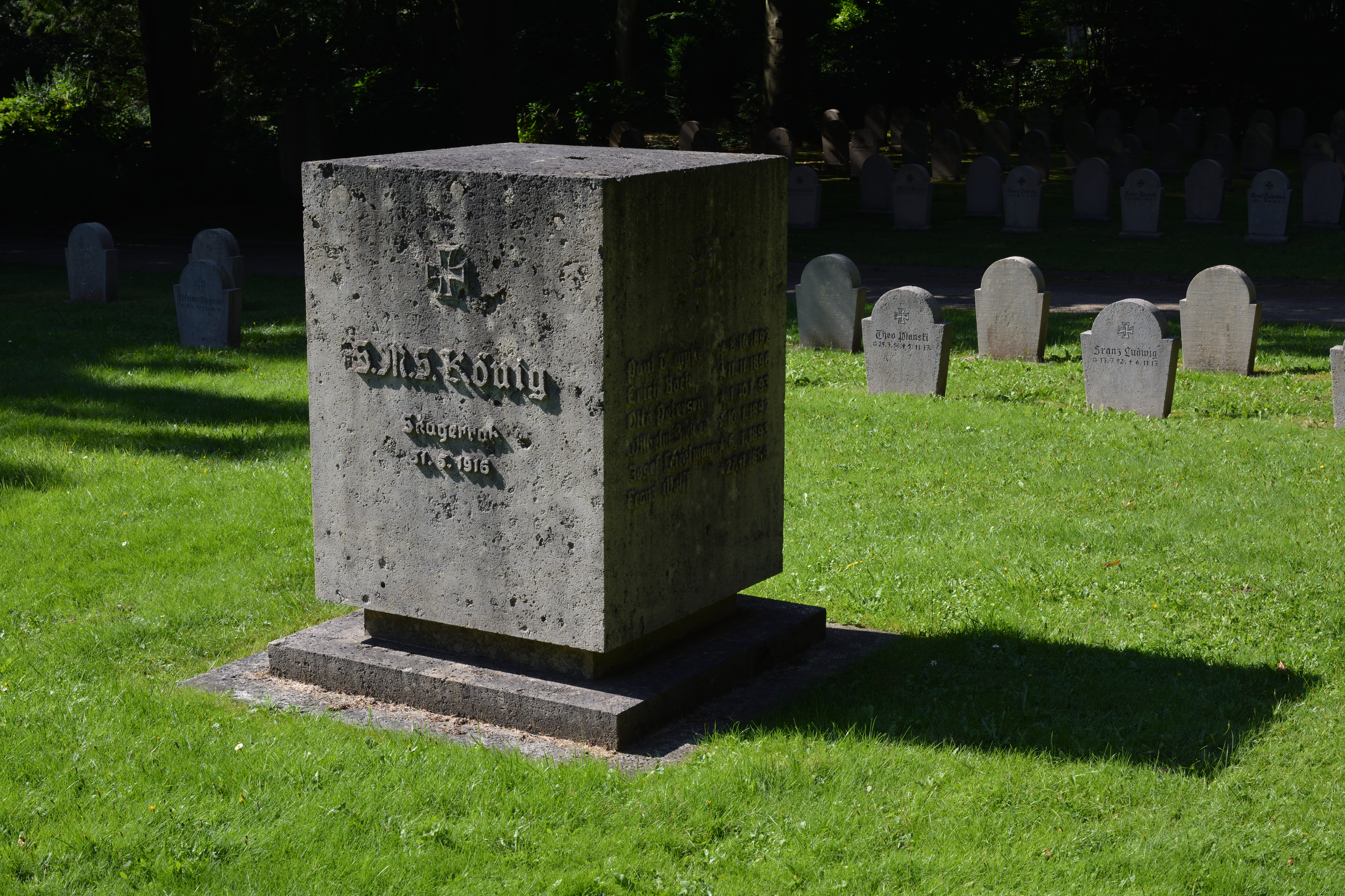 Impressionen aus dem Nordfriedhof in Kiel Ein Grossteil diese Friehofes ist den Gefallenen der beiden Weltkrige gewidmet.